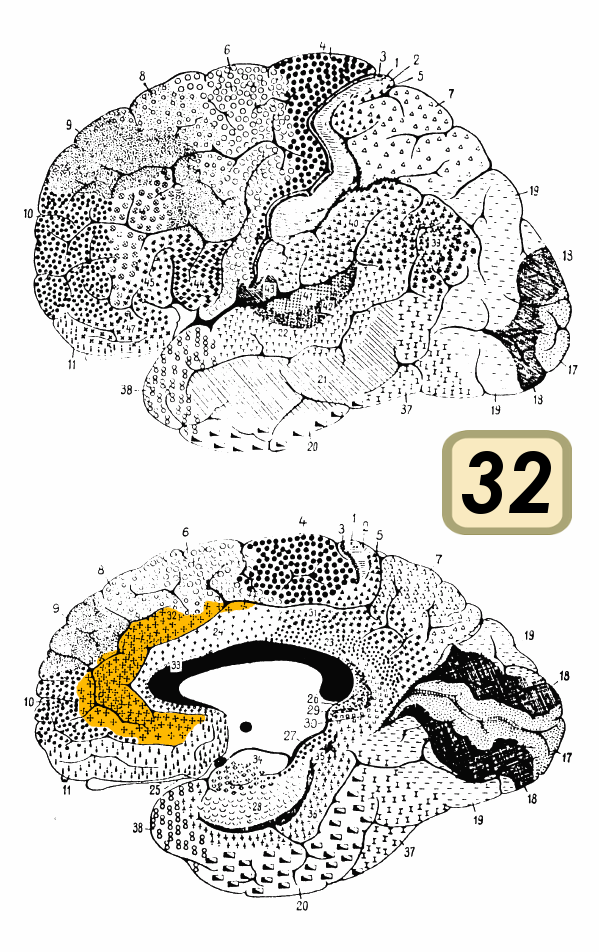 Brodmann area 32.